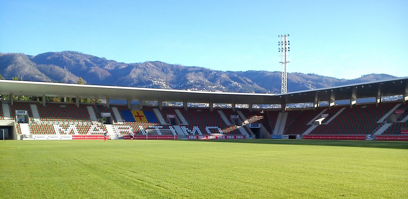 Topo Nordeste do Estádio dos Barreiros - Vista para as zonas altas